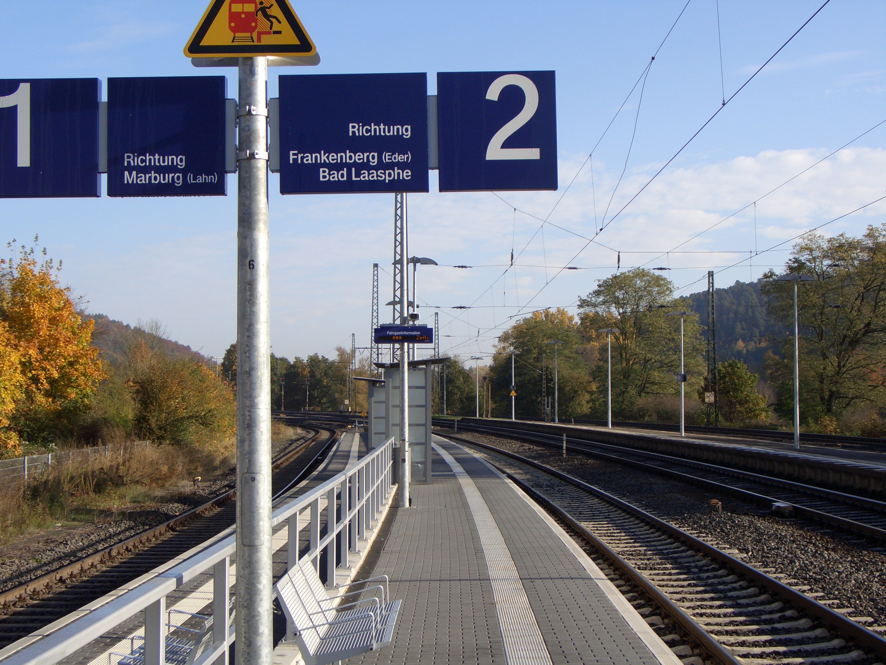 Die Ausstattung des Bahnsteiges der Gleise 1 und 2: Oben die Schilder mit Fahrtrichtung, unten eine Sitzbank und in der Mitte die Wartehäuschen und die moderne Fahrgastinformationsanzeige.